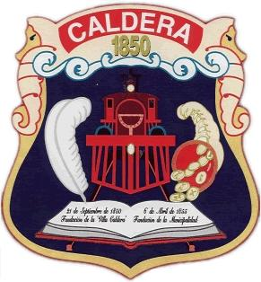 Logo de Caldera